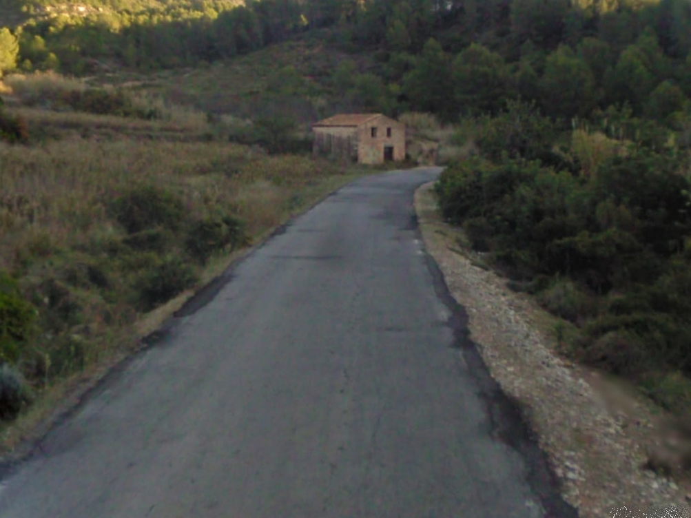 Carretera CV-148 en Cabanes, Castellón, España